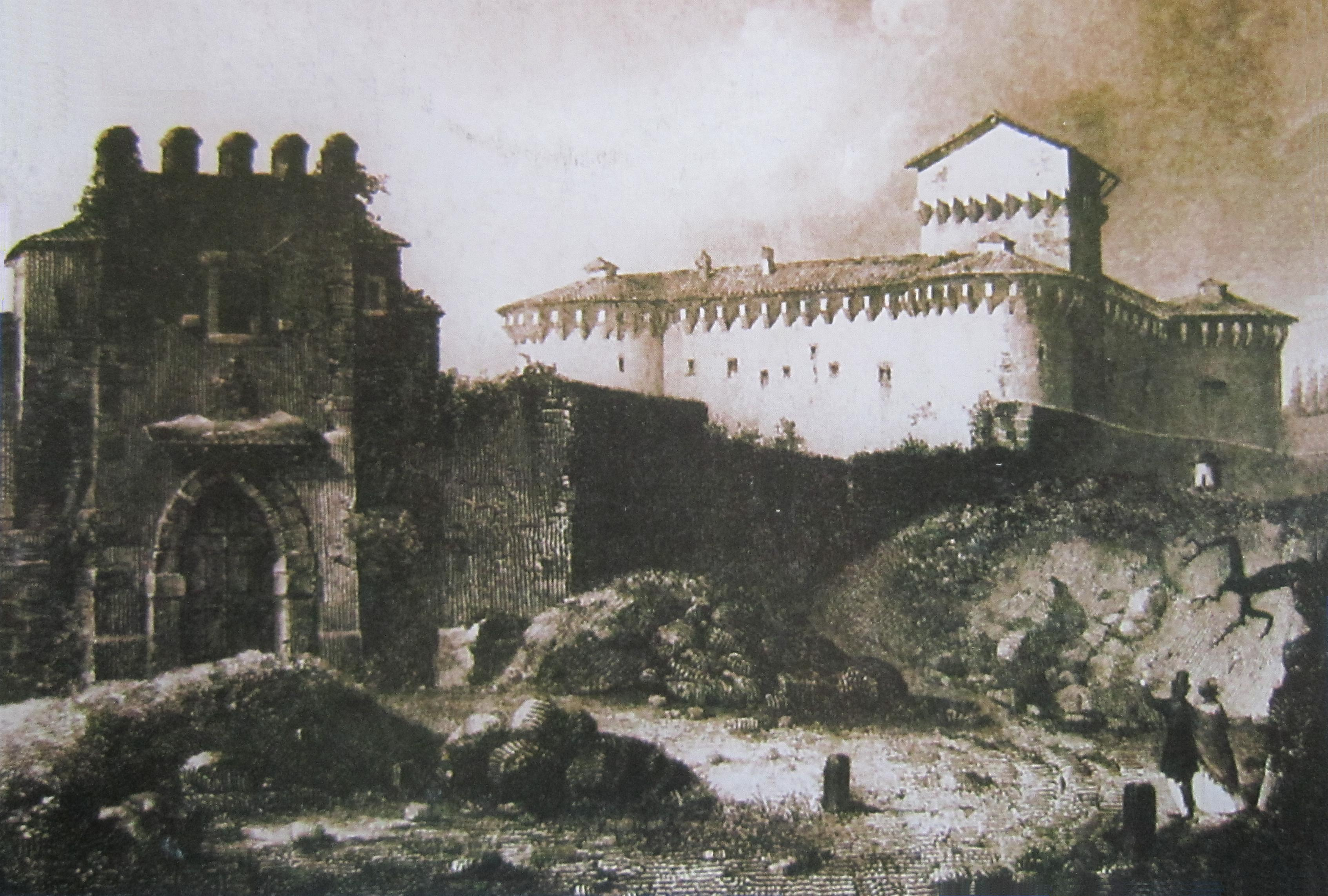 Porta Ravaldino e, sullo sfondo, la Rocca di Ravaldino, in una incisione di inizio Ottocento